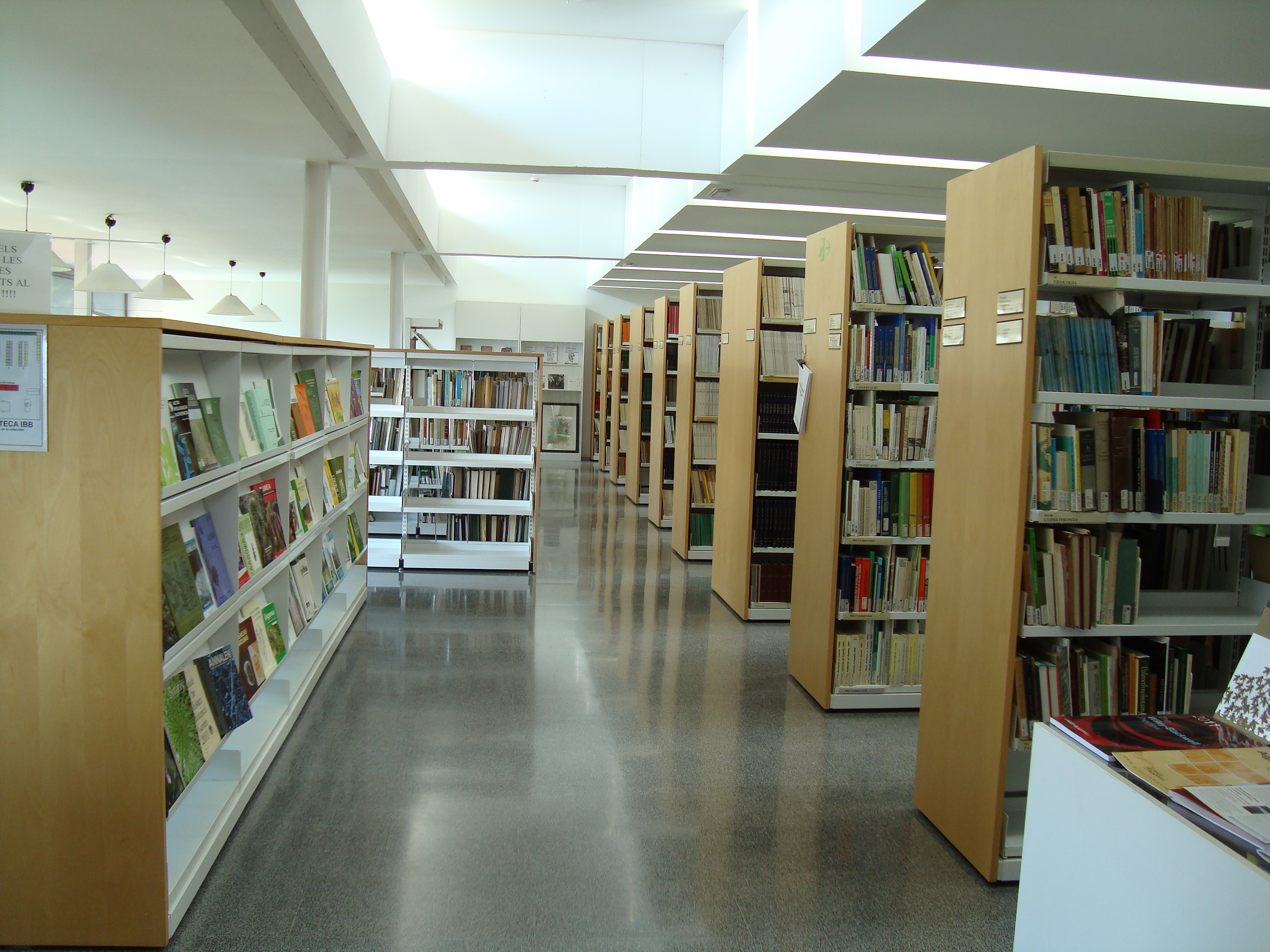 Biblioteca de l'Institut Botánic de Barcelona